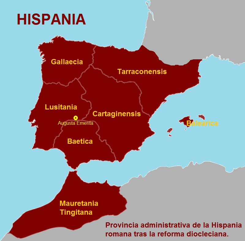 Provincia administrativa de la Hispania romana tras la reforma diocleciana.